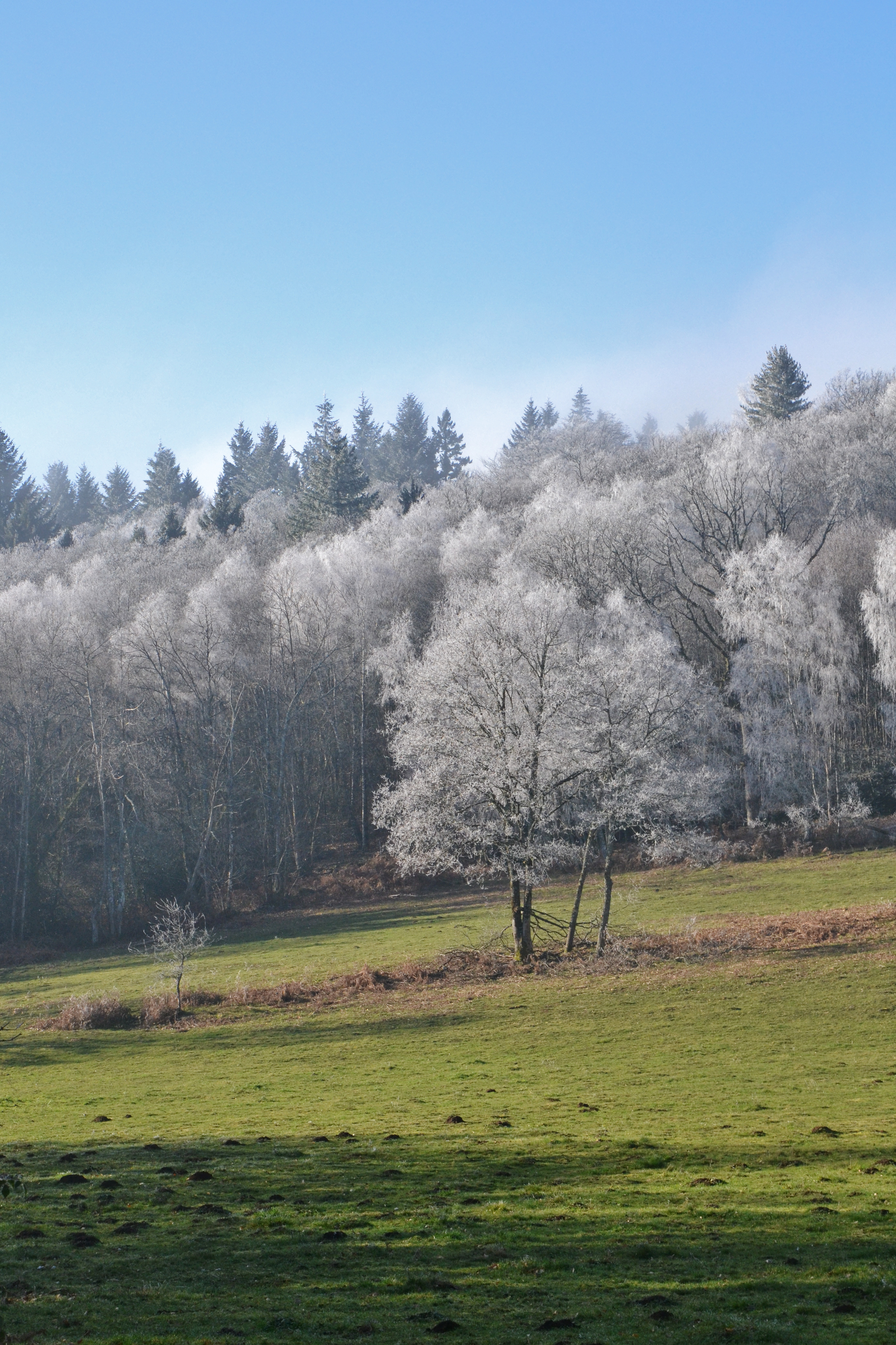 Arbres givrés dans les monts de Blond (Haute-Vienne, France)